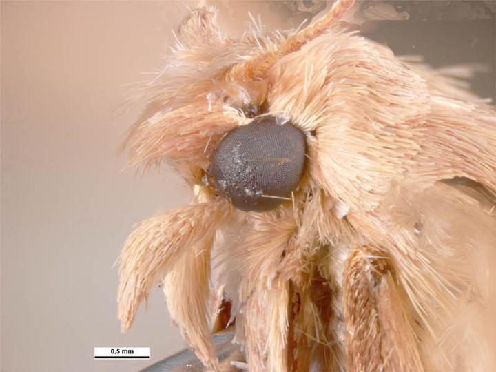 Eldana saccharina head